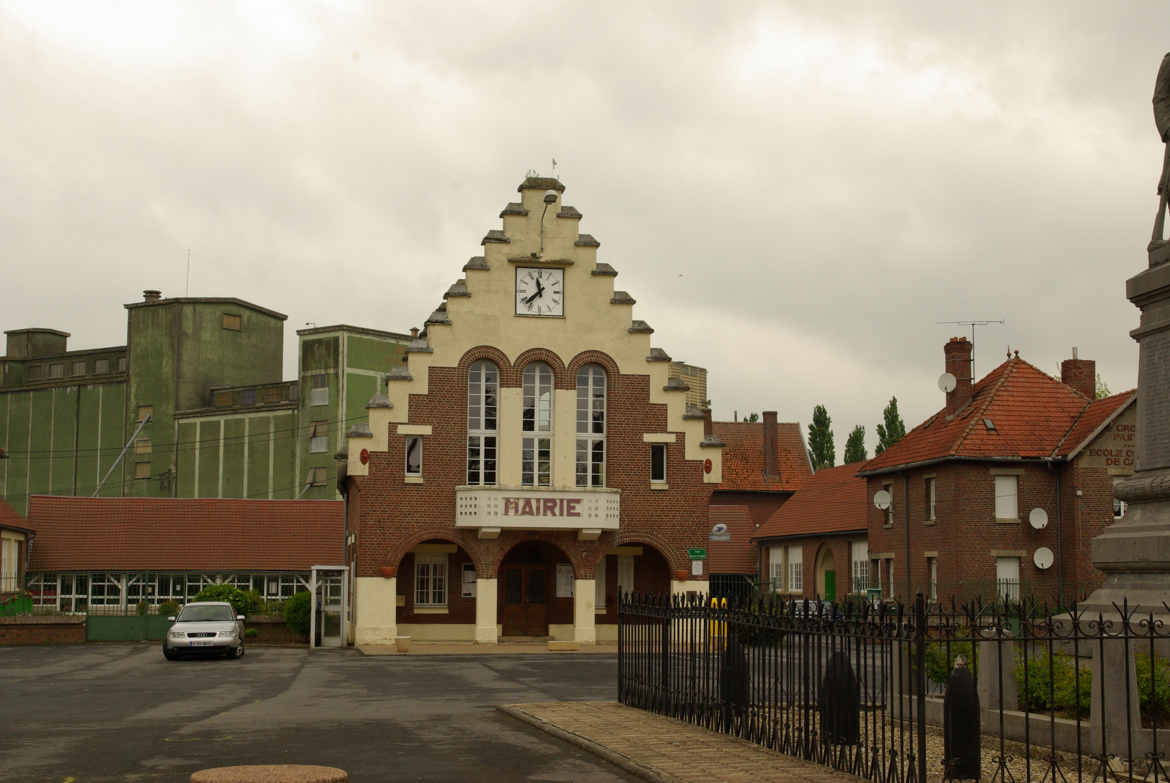 Gemeentehuis van Vendhuile